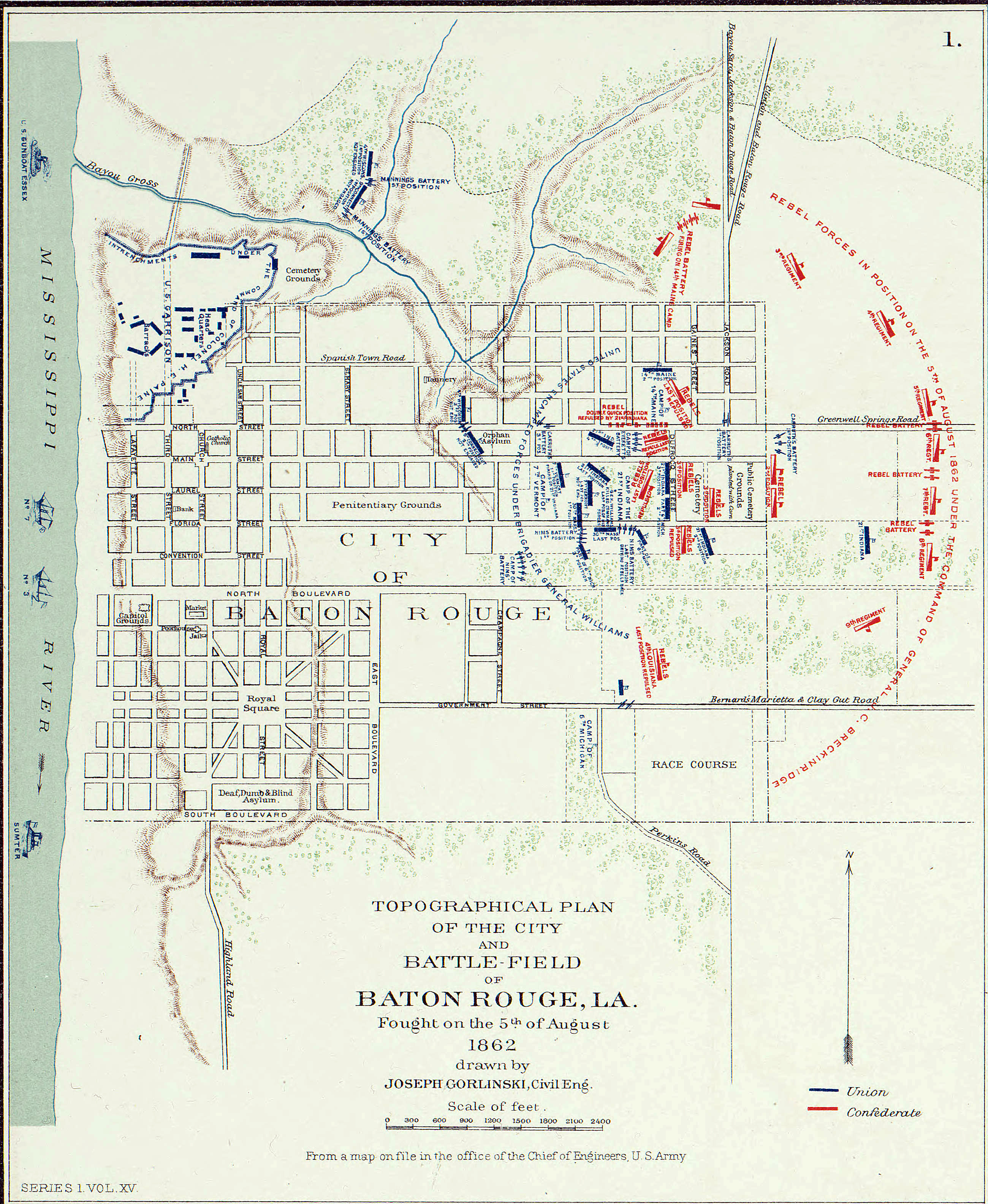 plan de Bâton Rouge USA